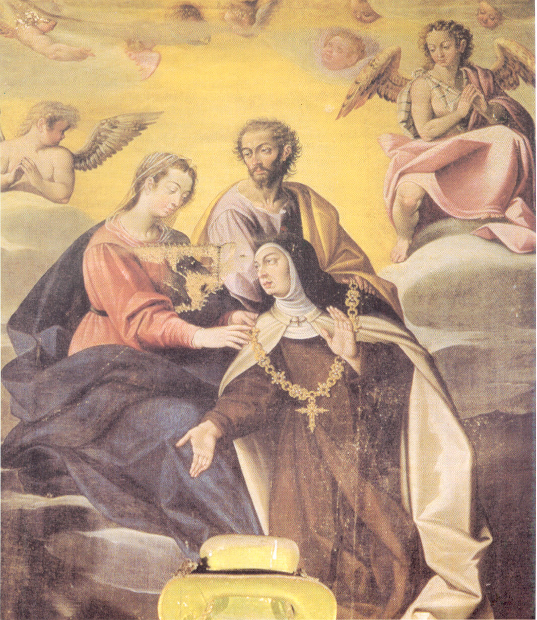 Juan de Peñalosa, Visión de Santa Tresa, ático del retablo de Santa Teresa, catedral de Astorga.